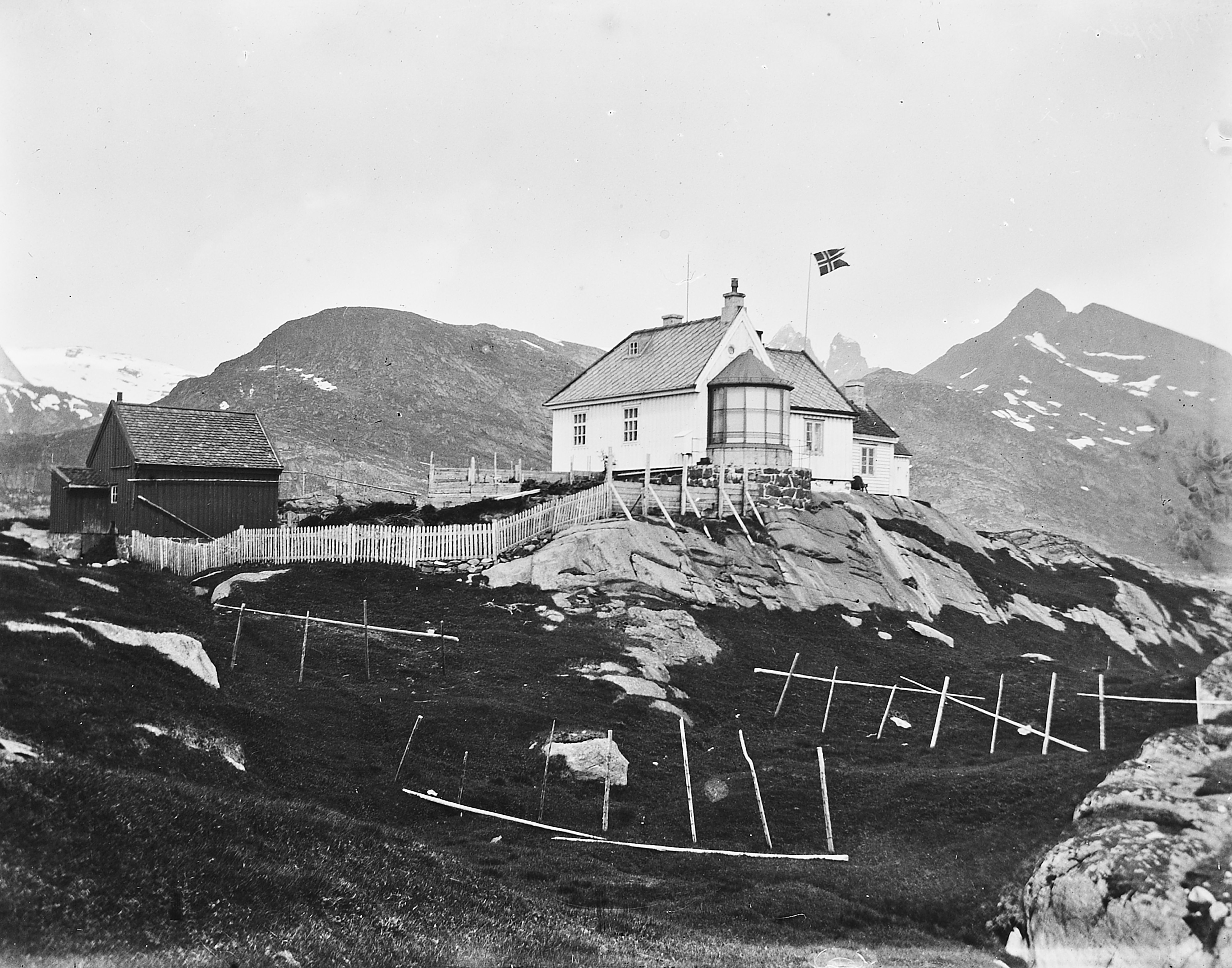 Bildet er hentet fra Arkivverket. Værøy, Værøy Arkivinstitusjon : Riksarkivet Arkivnavn : Fyrdirektoratet Sted : Norge, Nordland, Værøy, Værøy Emneord: Fyr, Kyst Avbildet